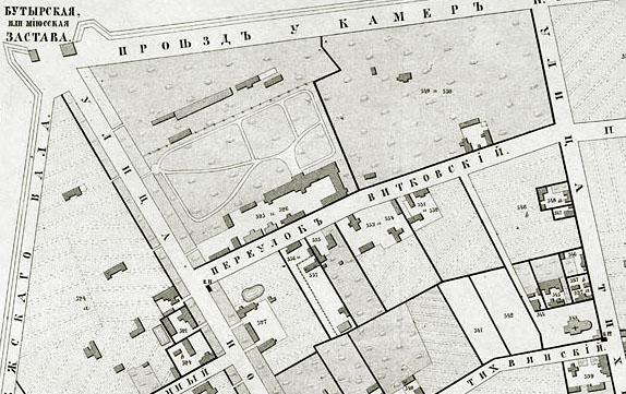 Moscow, 1852 map of Vadkovsky Lane with Golitsyn estate Москва, 1852, район Вадковского переулка